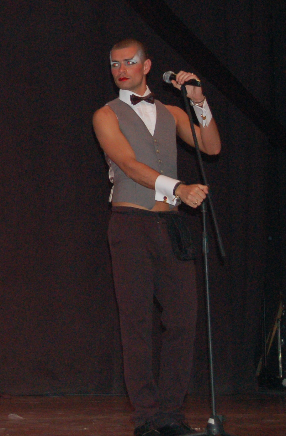 Davide Salvado no Teatro Principal de Pontevedra nun espectáculo de cabaré